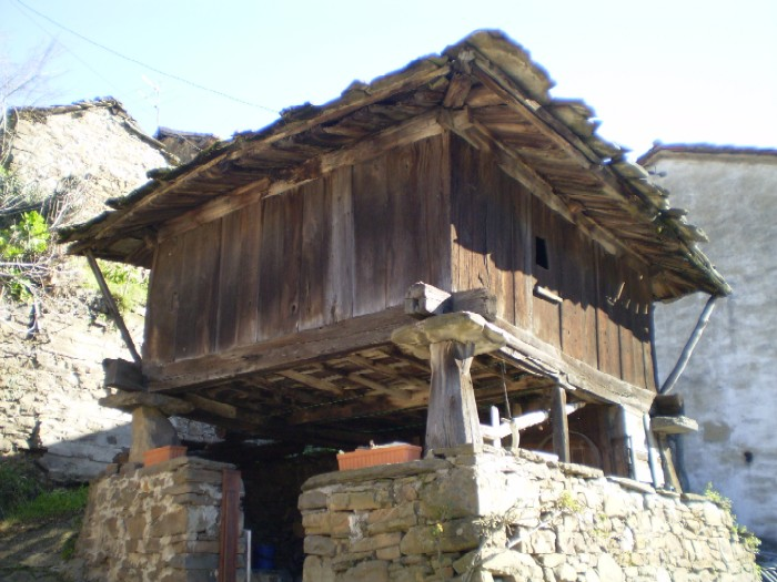 hórreo